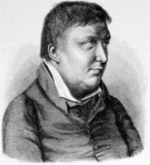 Friedrich von Schlegel Aus der englischen WikiPedia (dort: Scanned from German "Meyer's Encyclopedia", 1906 by Magnus Manske)